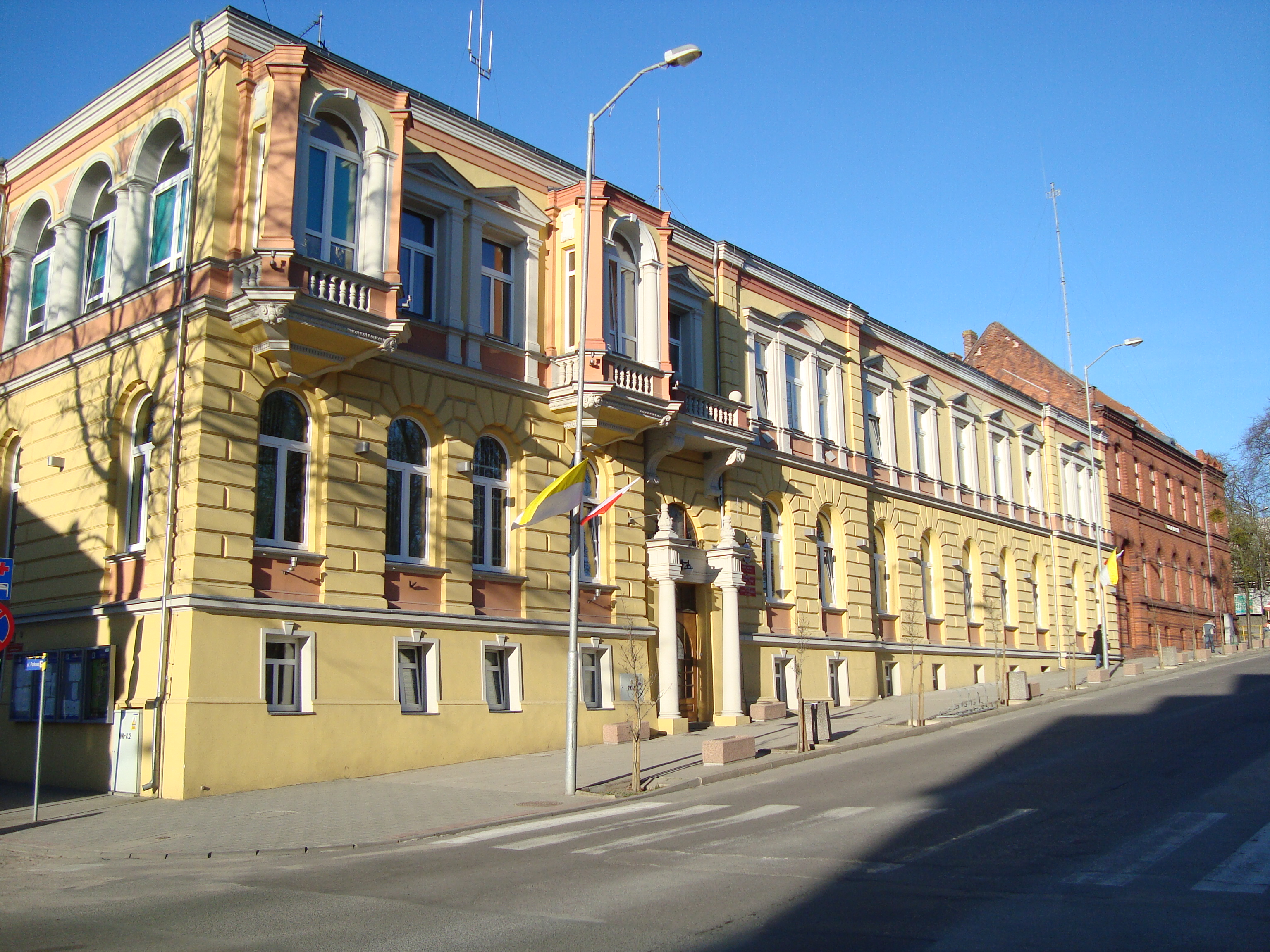 Urząd Miasta i Gminy w Gryfinie